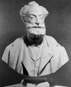 Ernest Cézanne (1830-1876)